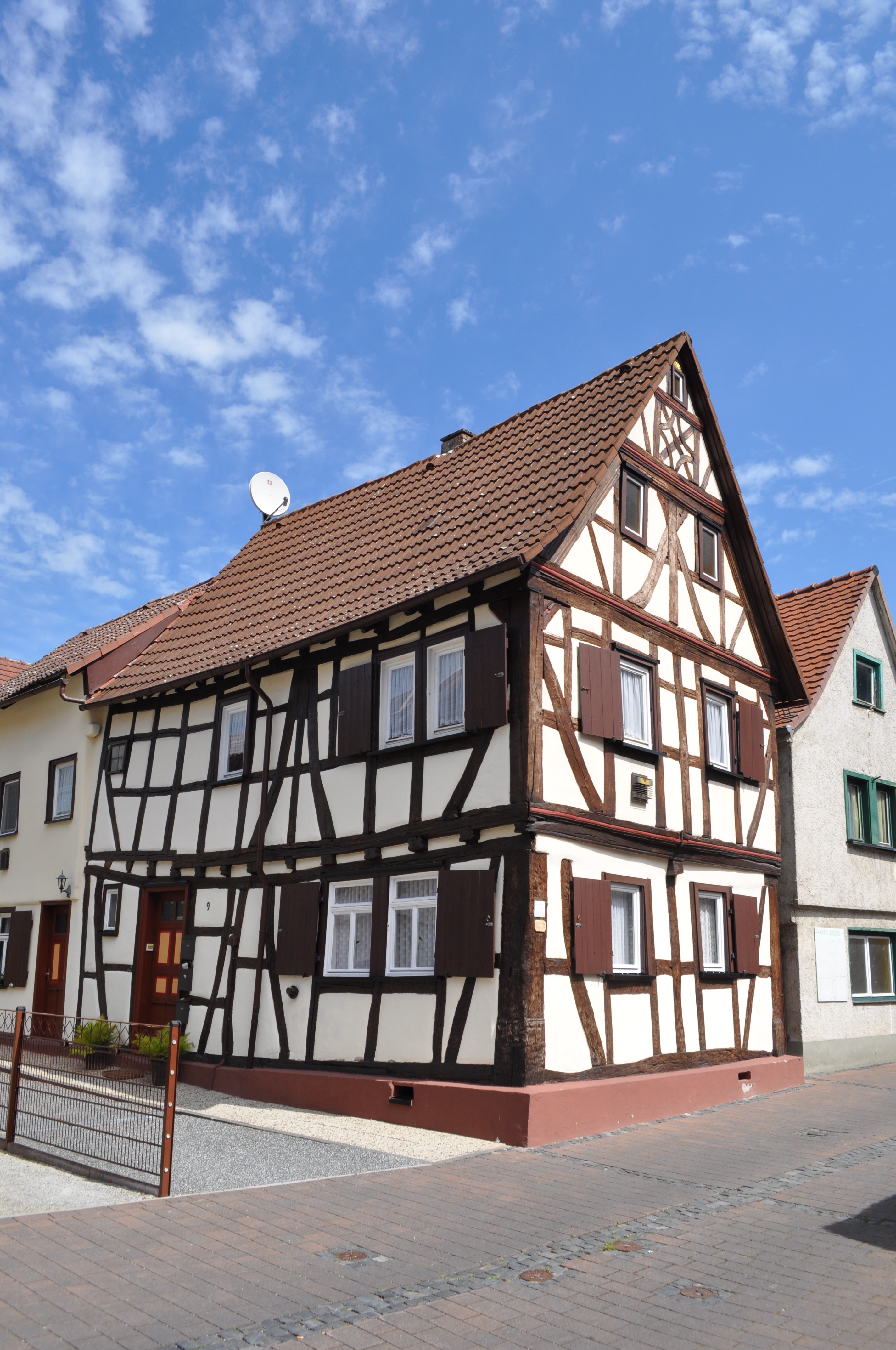 Haus Hauptstr. 9 in Kirdorf. Das Fachwerkhaus wurde 1664 erbaut und 2004 renoviert.